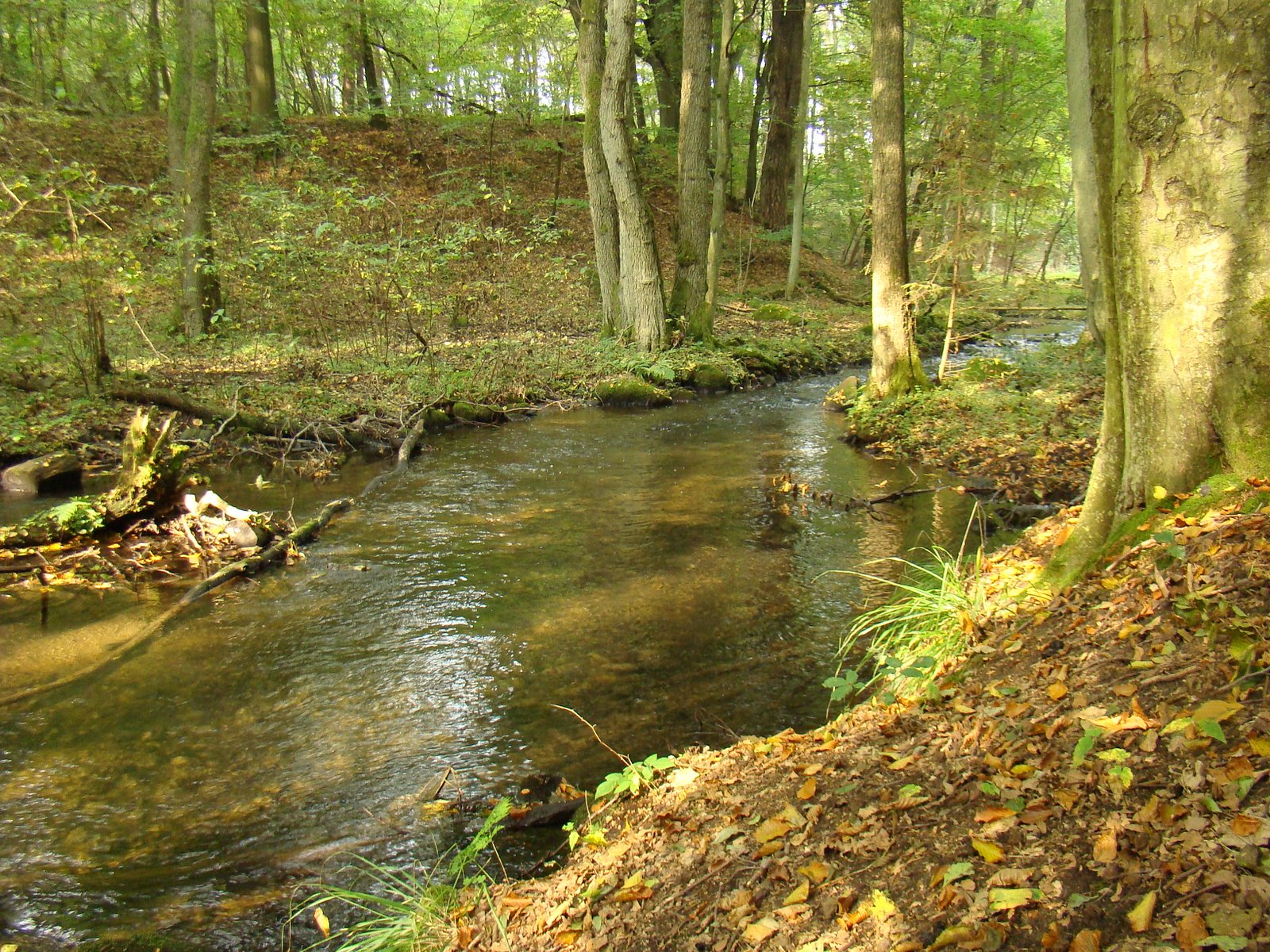 Krzemieńskie Zródliska